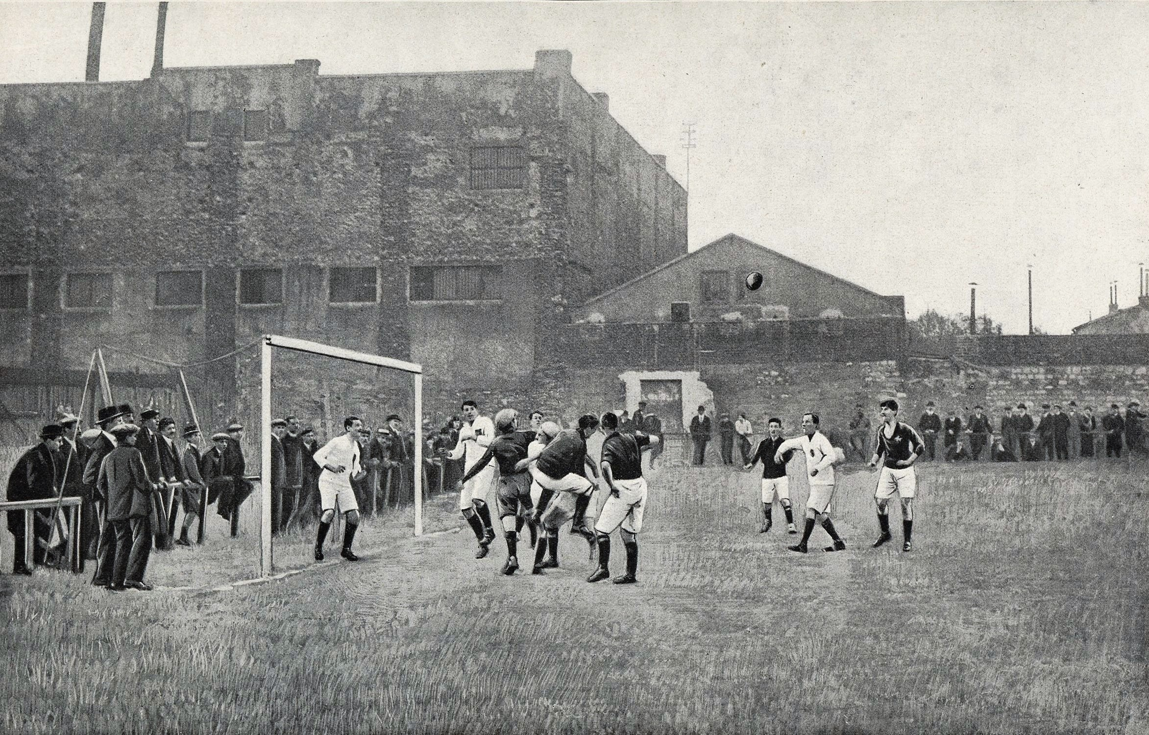 Finale de la Coupe de France de football 1916 (Trophée de France) entre l'Olympique (en clair) et l'Etoile des Deux Lacs (en foncé).